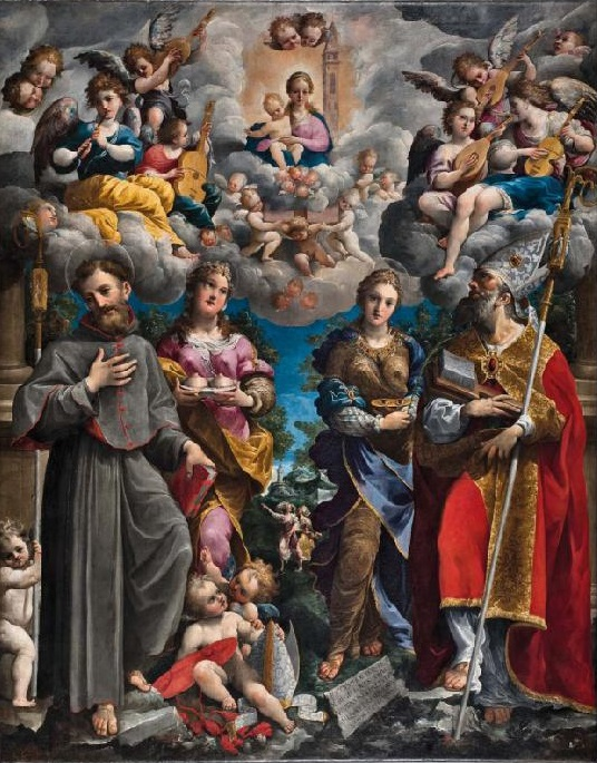 Annibale Castelli (1573-1623), Madonna di Loreto col Bambino e santi (Chiesa di San Francesco d’Assisi, Mirandola)